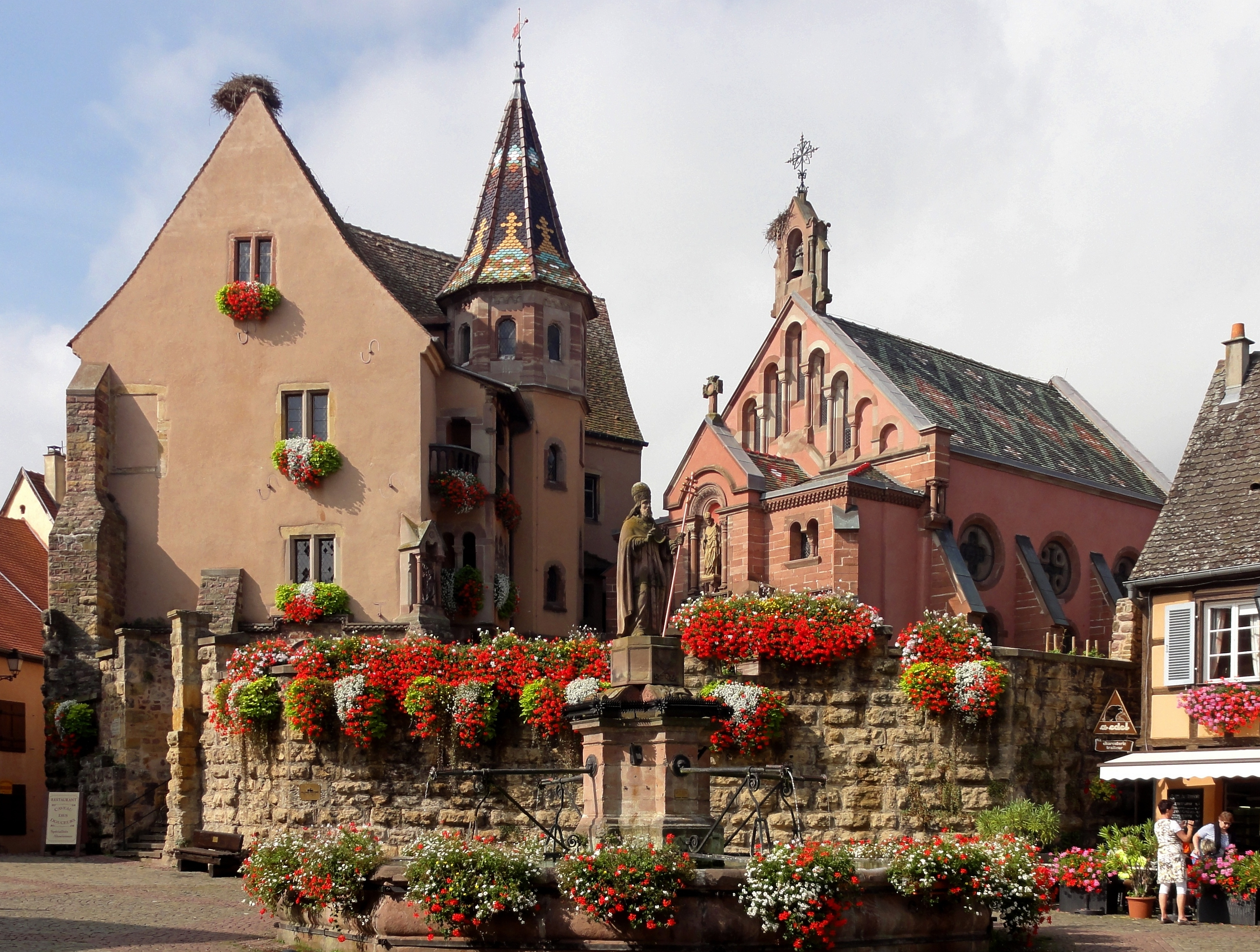 Egisheim, Elsass, Schloss und Kapelle St. Leo IX.